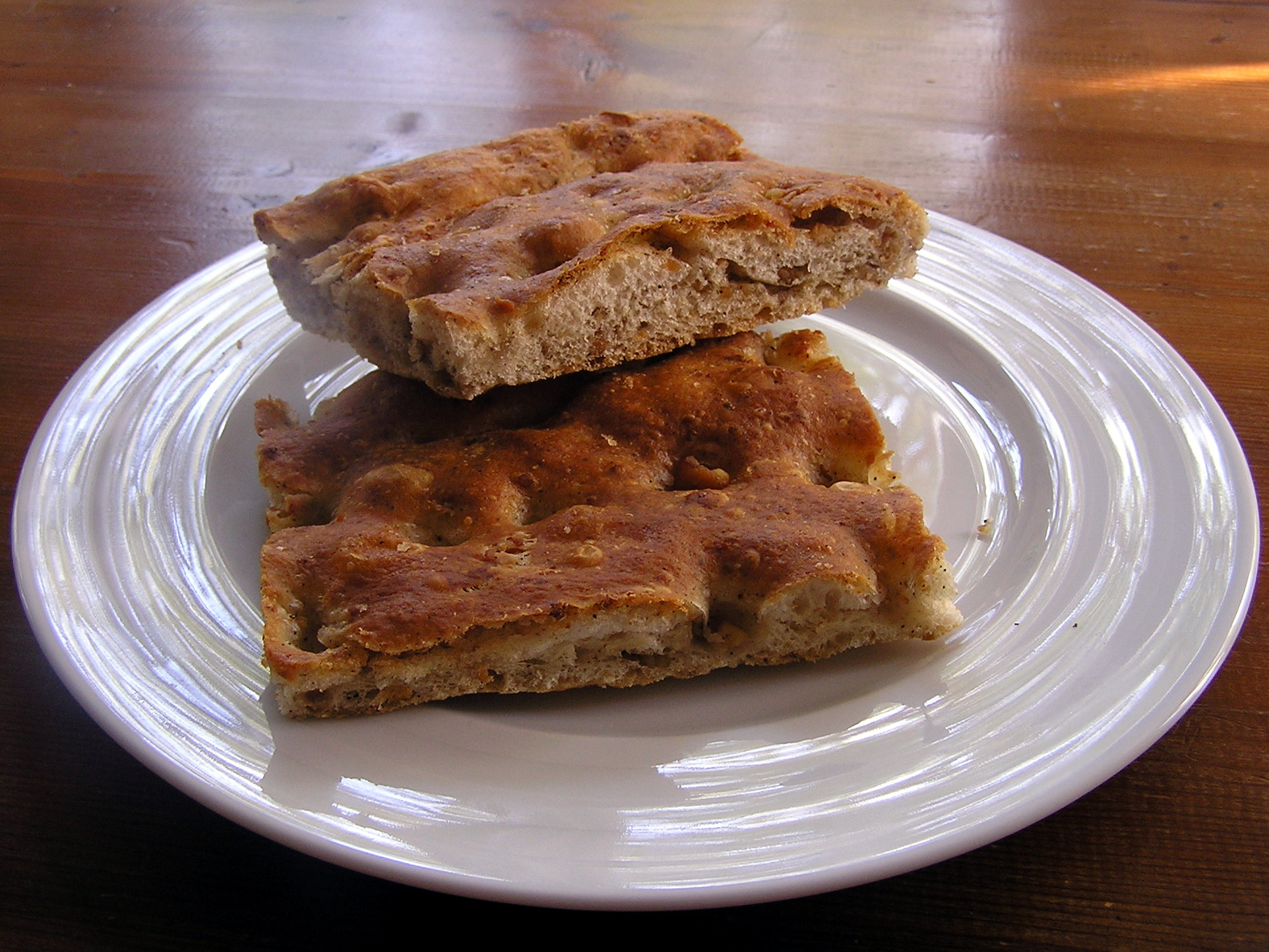 Fette di pizza con i grasselli, prodotto tipico di Ancona